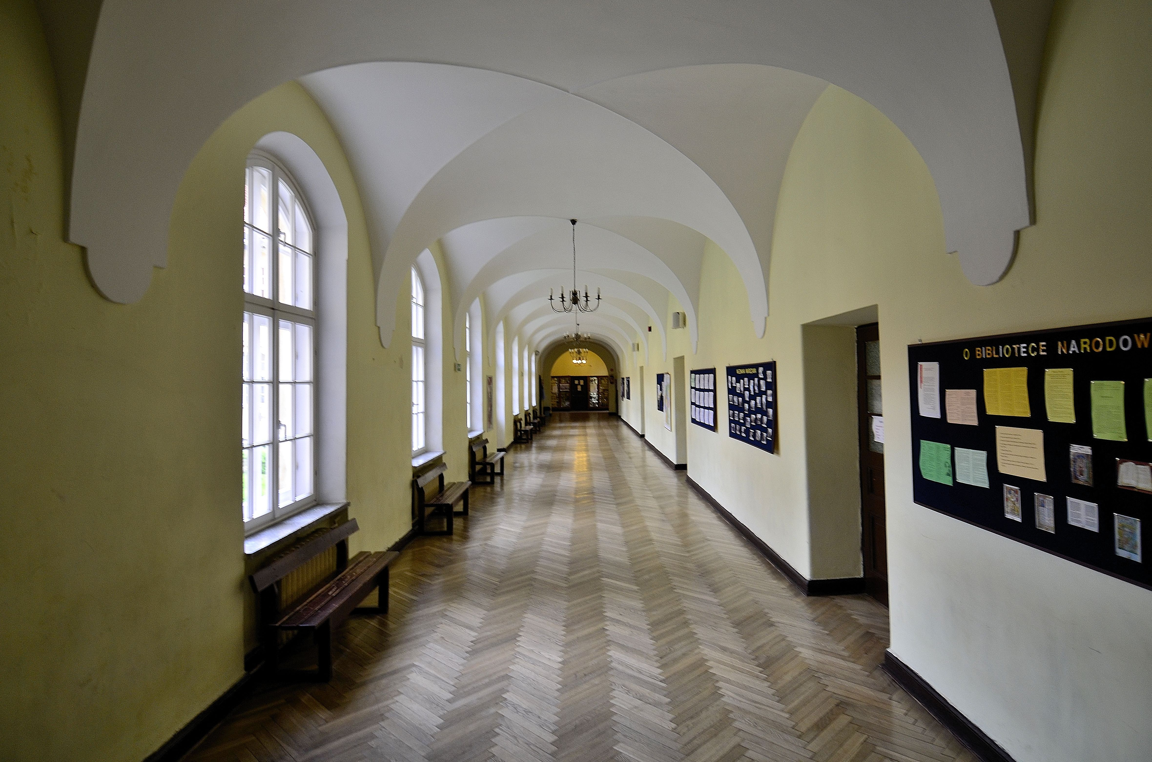 Korytarz na parterze Gimnazjum i Liceum im. Stefana Batorego w Warszawie